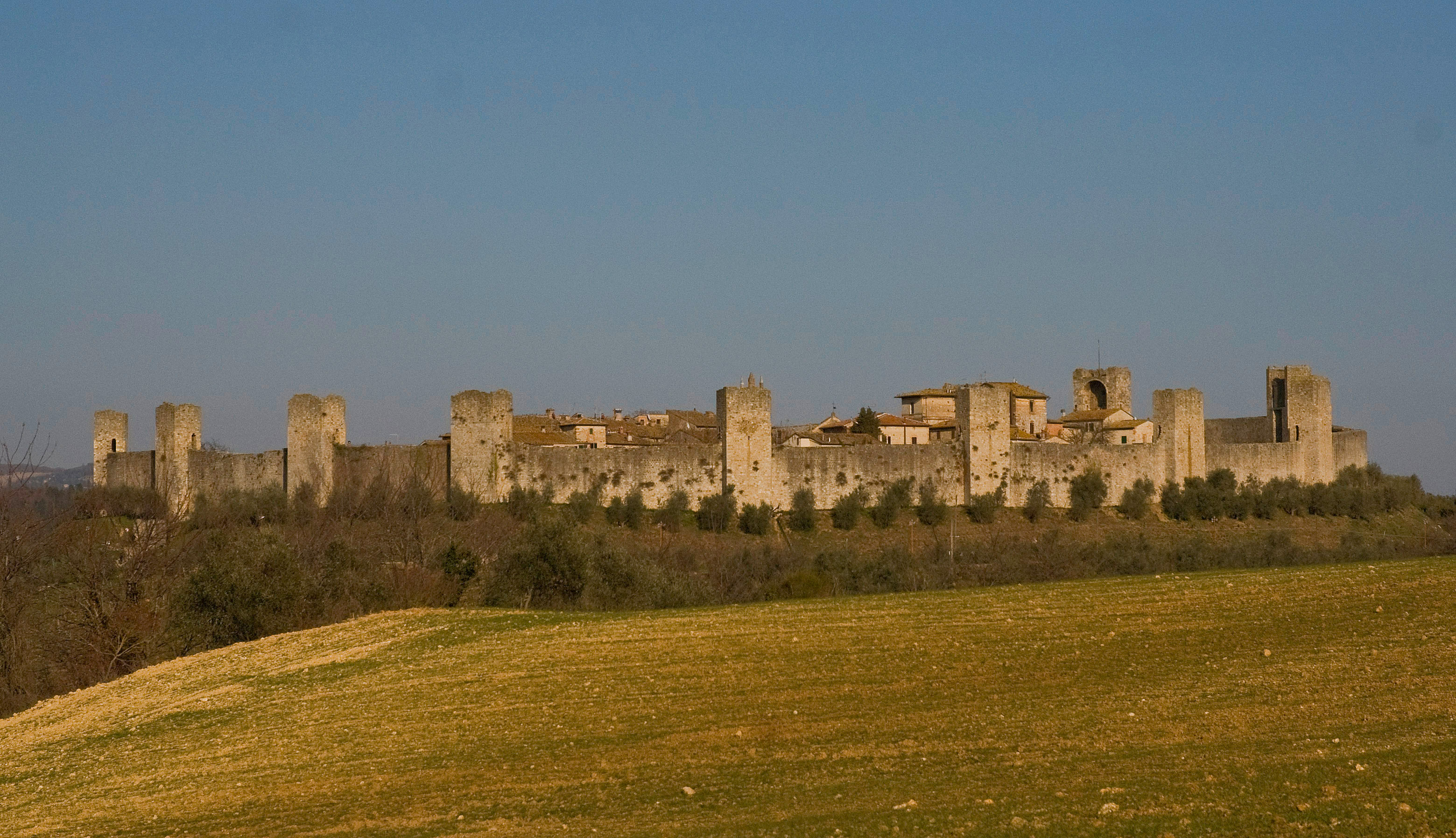 panorama del castello di monteriggioni